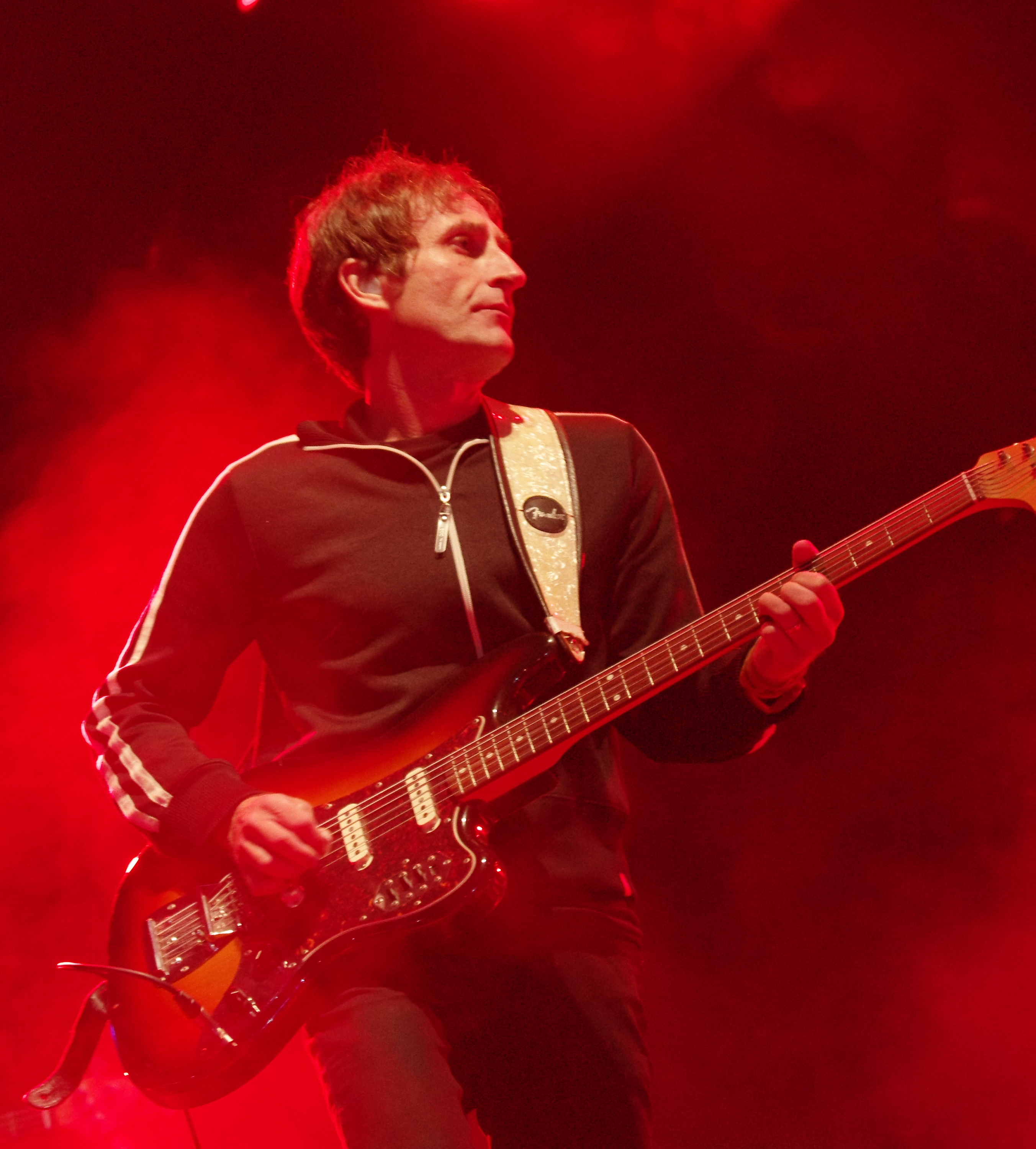 James (band) auf dem Haldern Pop Festival 2013. Hauptbühne. Besetzung: Tim Booth (Gesang) Jim Glennie (Bass) Larry Gott (Gitarre) Saul Davies (Gitarre, Violine, Percussion) Mark Hunter (Keyboards) Dave Baynton-Power (Schlagzeug) Andy Diagram (Trompete, Percussion)